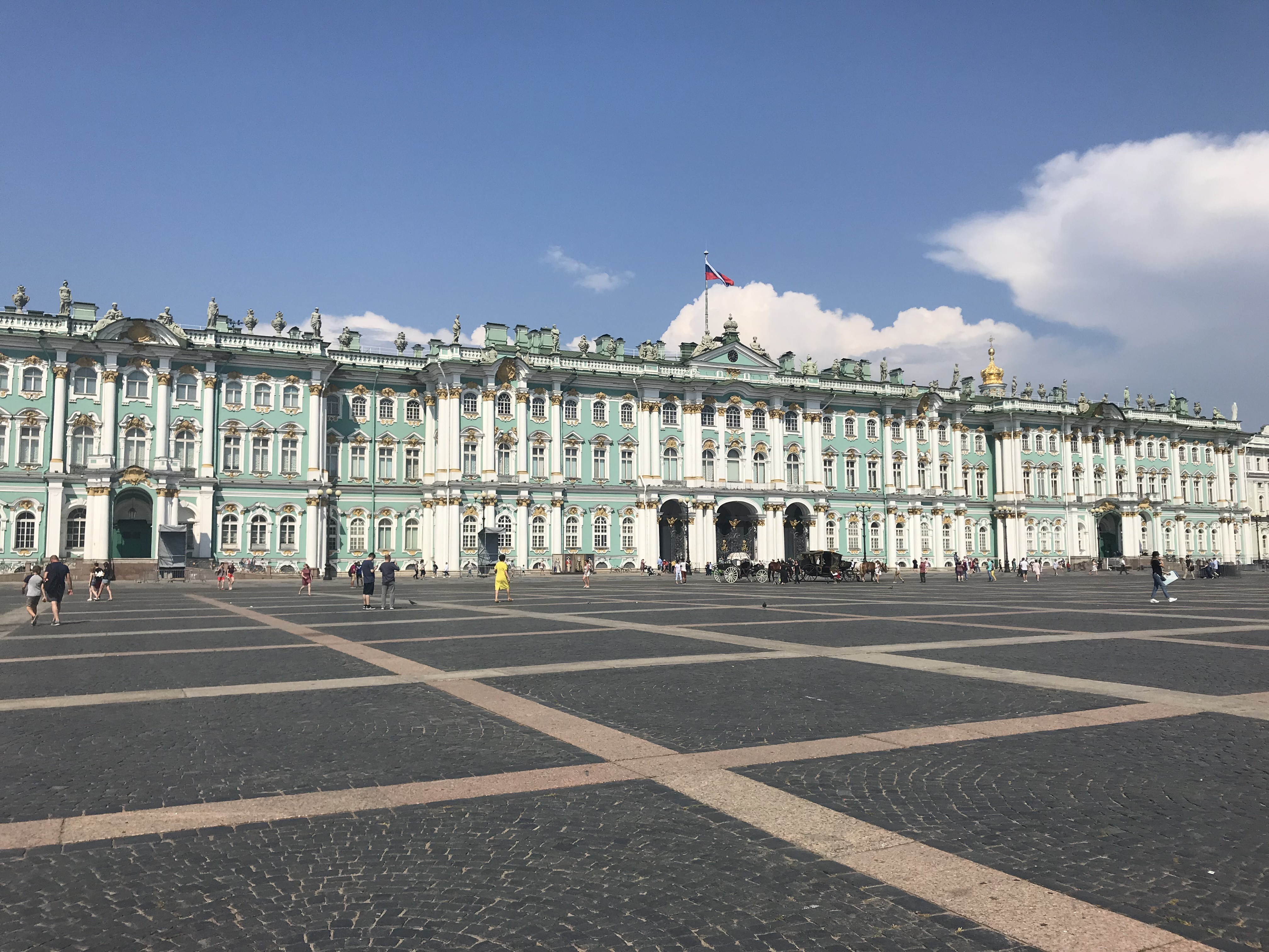 Volontørtjenestens kontorer er på Vinterpaladset i Sankt Petersborg